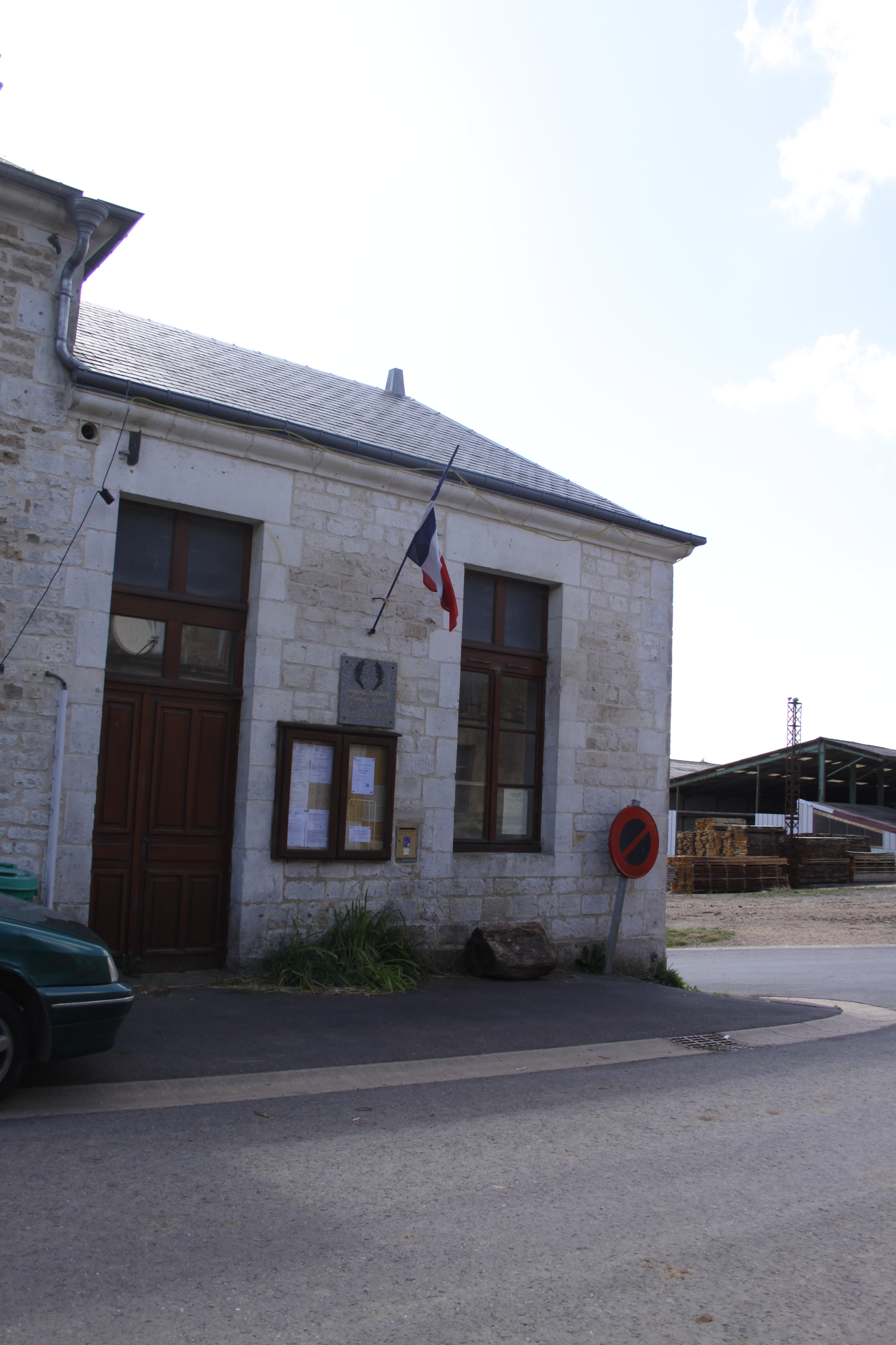 Village Ardennais